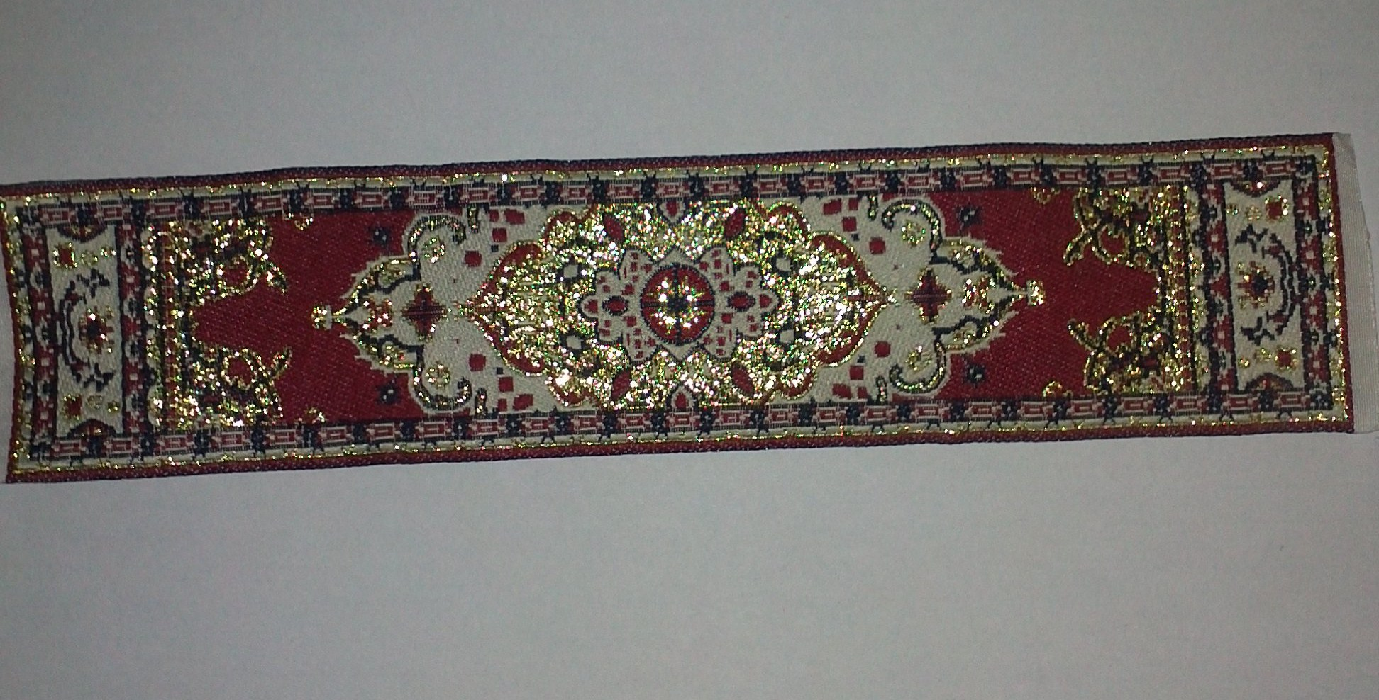 Záložka do knihy.